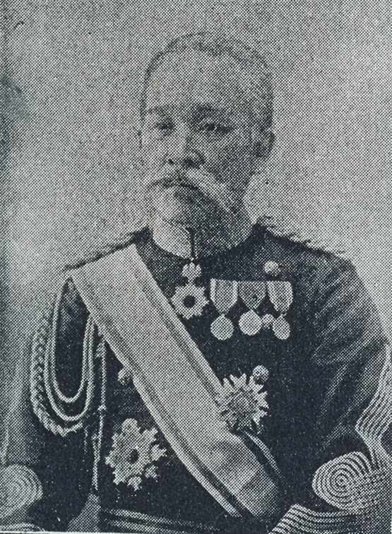 黒川通軌男爵(1843～1903)